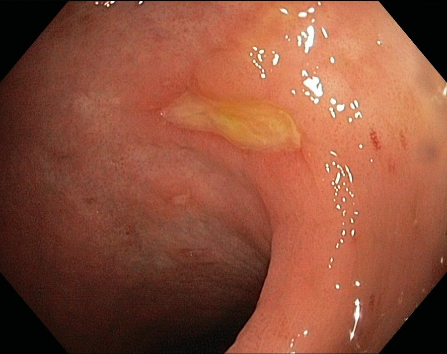 Endoskopische Aufnahme eines Ulcus recti simplex.